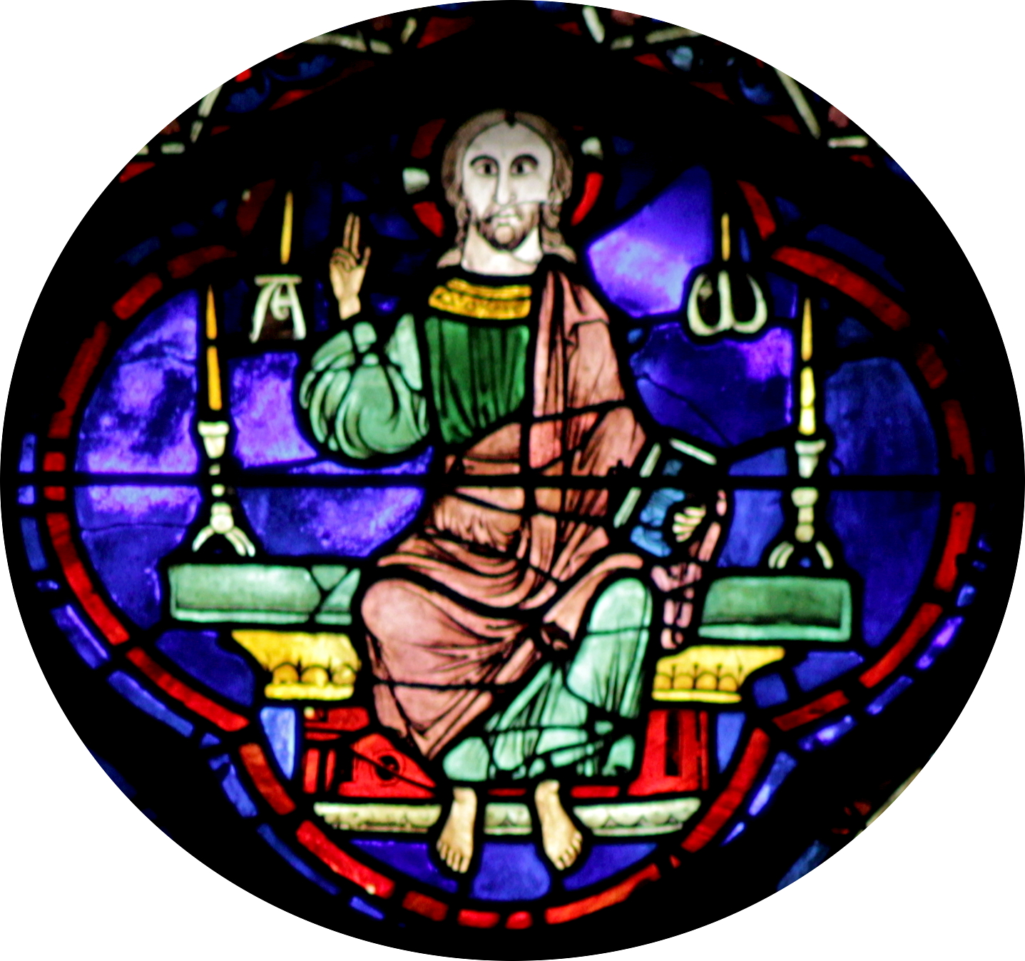 le zodiaque et les travaux des mois (lancette gauche, baie 28a). Le Christ maître du temps.